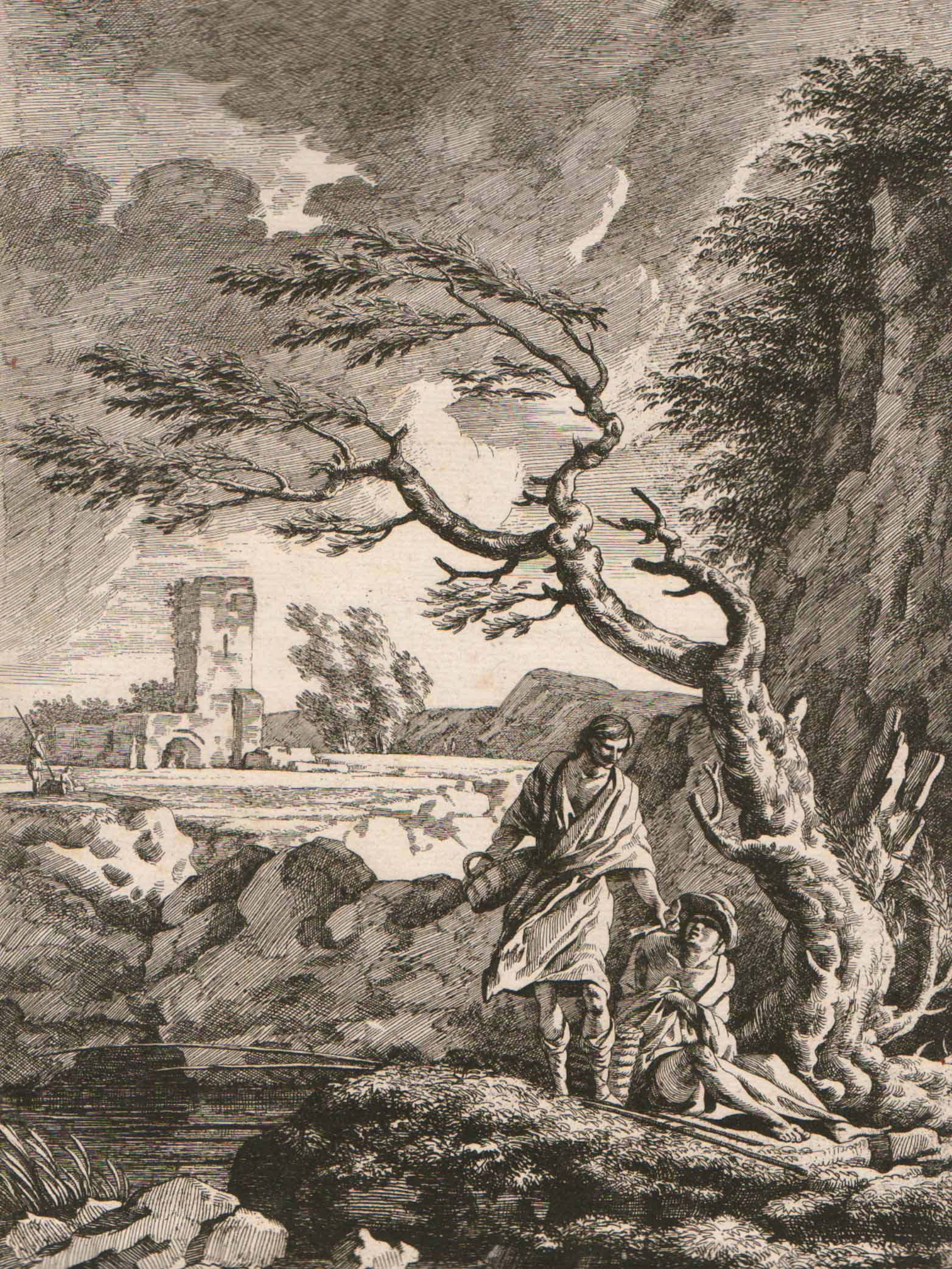 Template:P. Ozann after J. Vernet